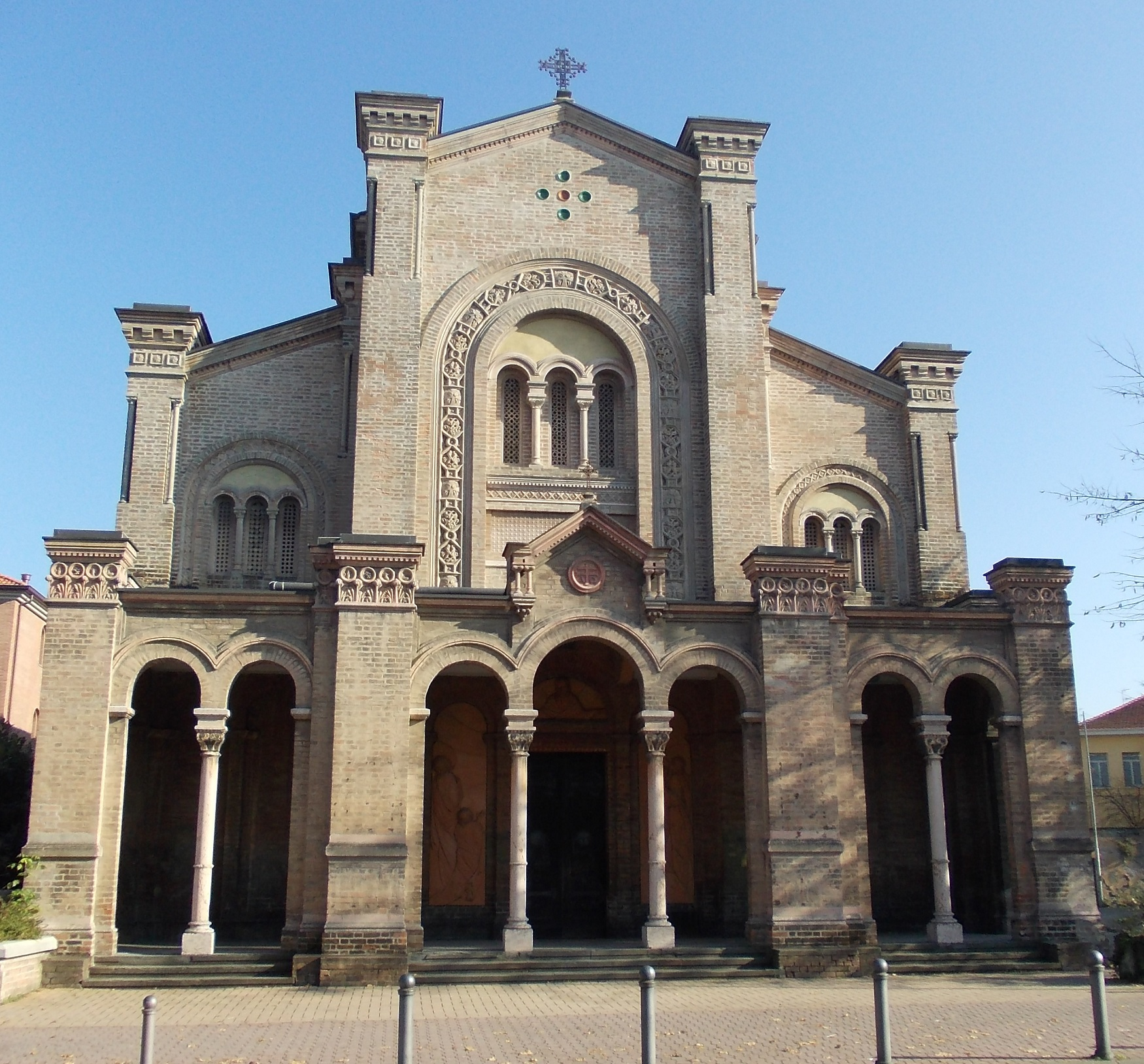 La facciata della chiesa di San Leonardo a Parma